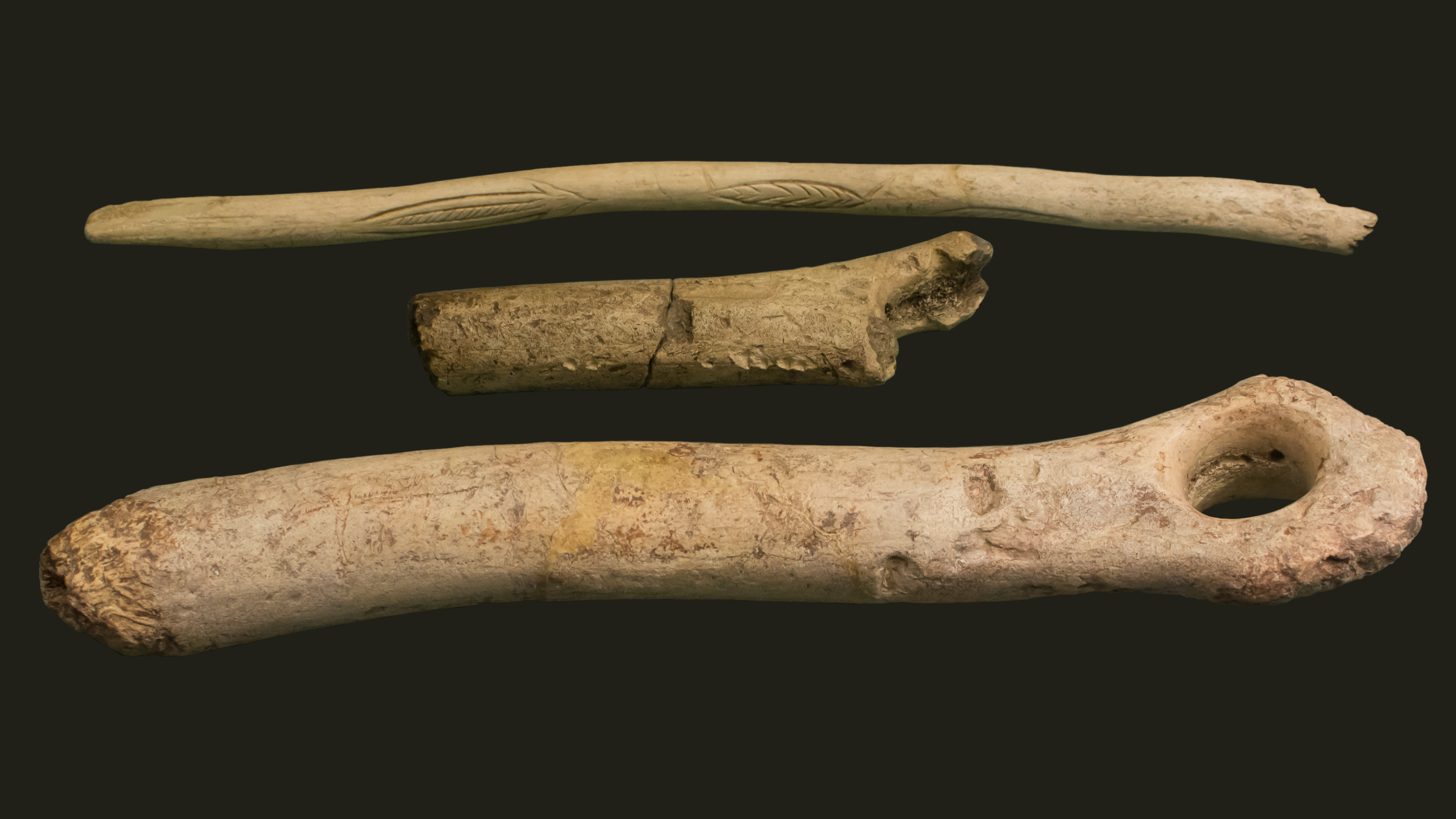 Petersfelshöhle bei Engen: Lochstab und Rentiergeweihstangen mit Gravuren, Magdalénien.